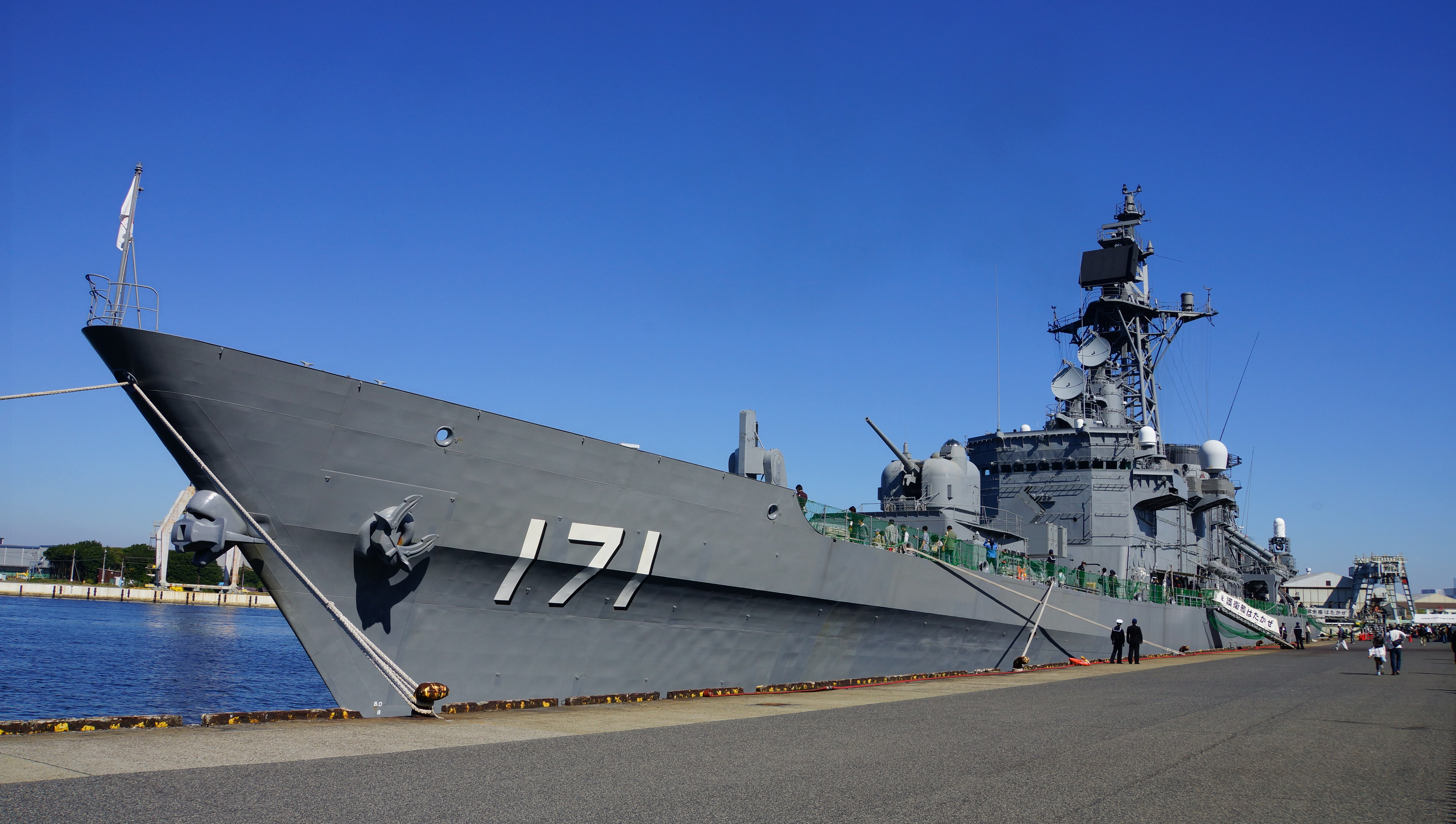 海上自衛隊 ミサイル護衛艦はたかぜ（DDG-171）。 14年10月19日 堺泉北港にて。